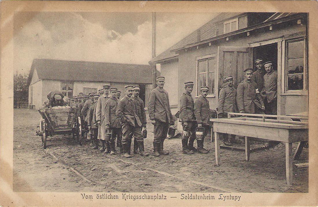 Беларуская (тарашкевіца): Лынтупы (Łyntupy), Кашары (Kašary)